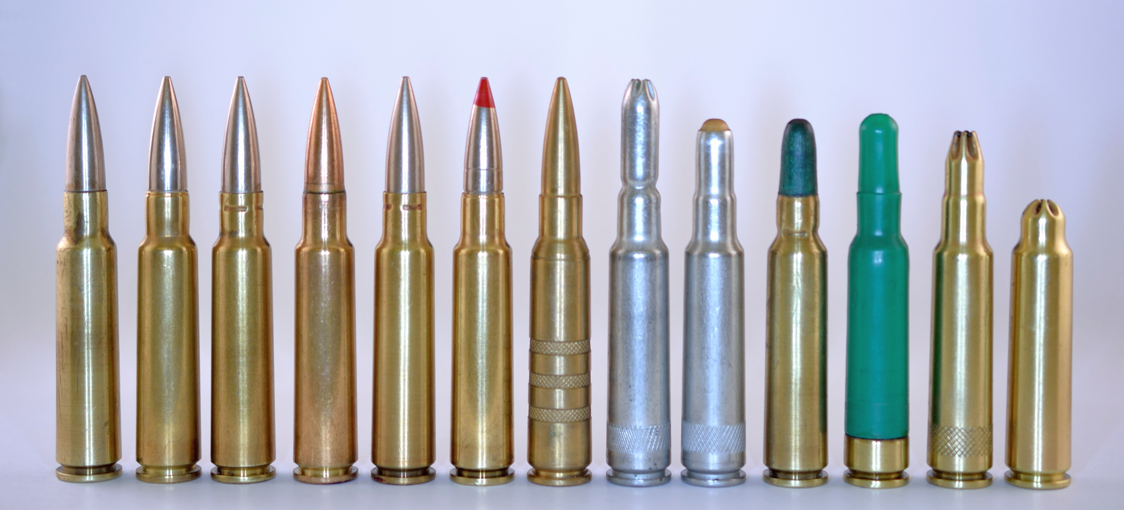 GP 11 cartouche à balle d'ordonnance 11, cartouche à balle modif. 1929, cartouche à balle modif. 1942, balle perforante, balle lumineuse (2x), cartouche de manipulation, propulsive 44 et variante, maquage Fm 25, marquage 58, maquage 85, marquage Cadet.